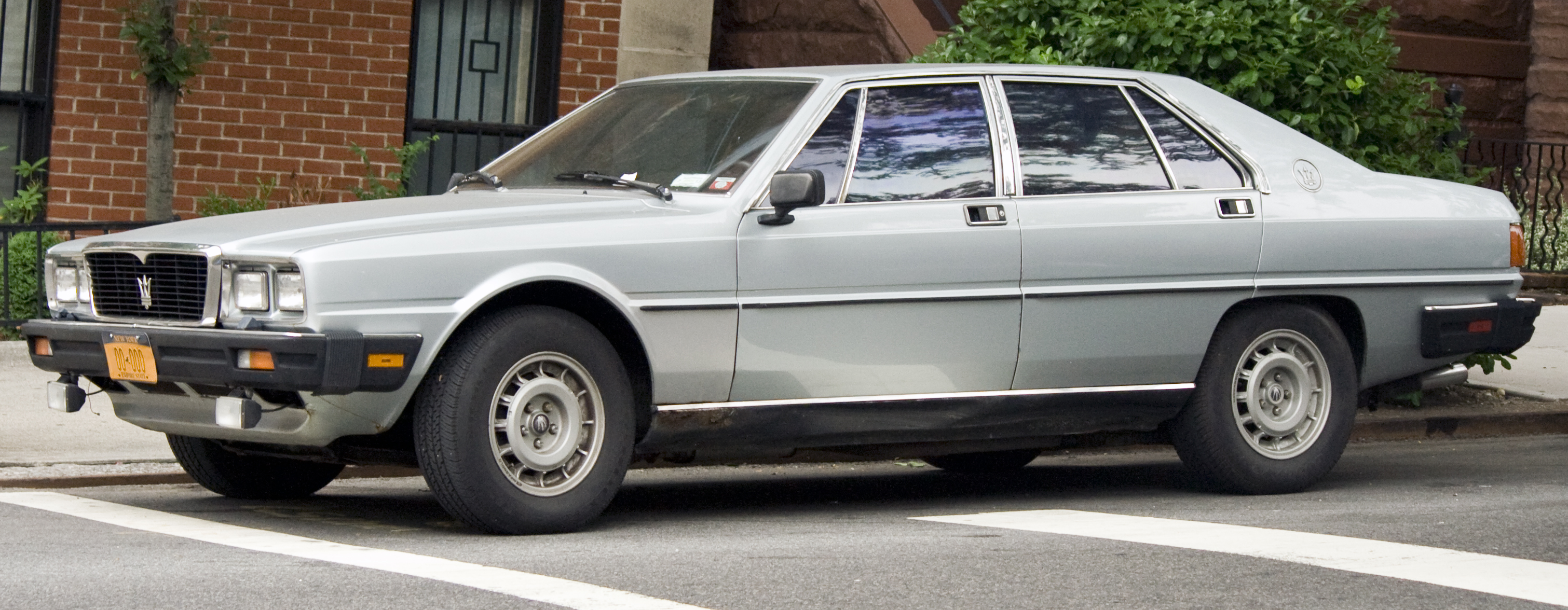 A 1986 Maserati Quattroporte III, seen in NY